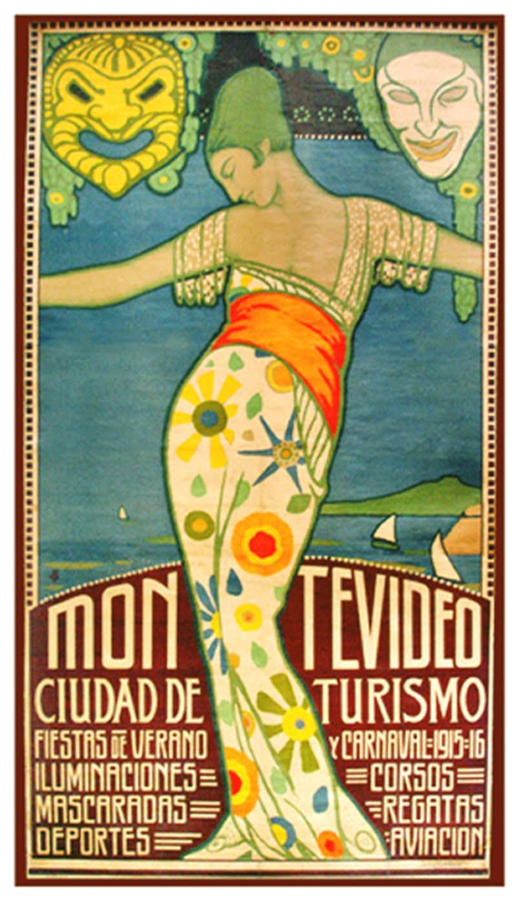 Afiche promocional del Carnaval (mas largo del mundo), verano de 1915-1916. Montevideo, Uruguay.